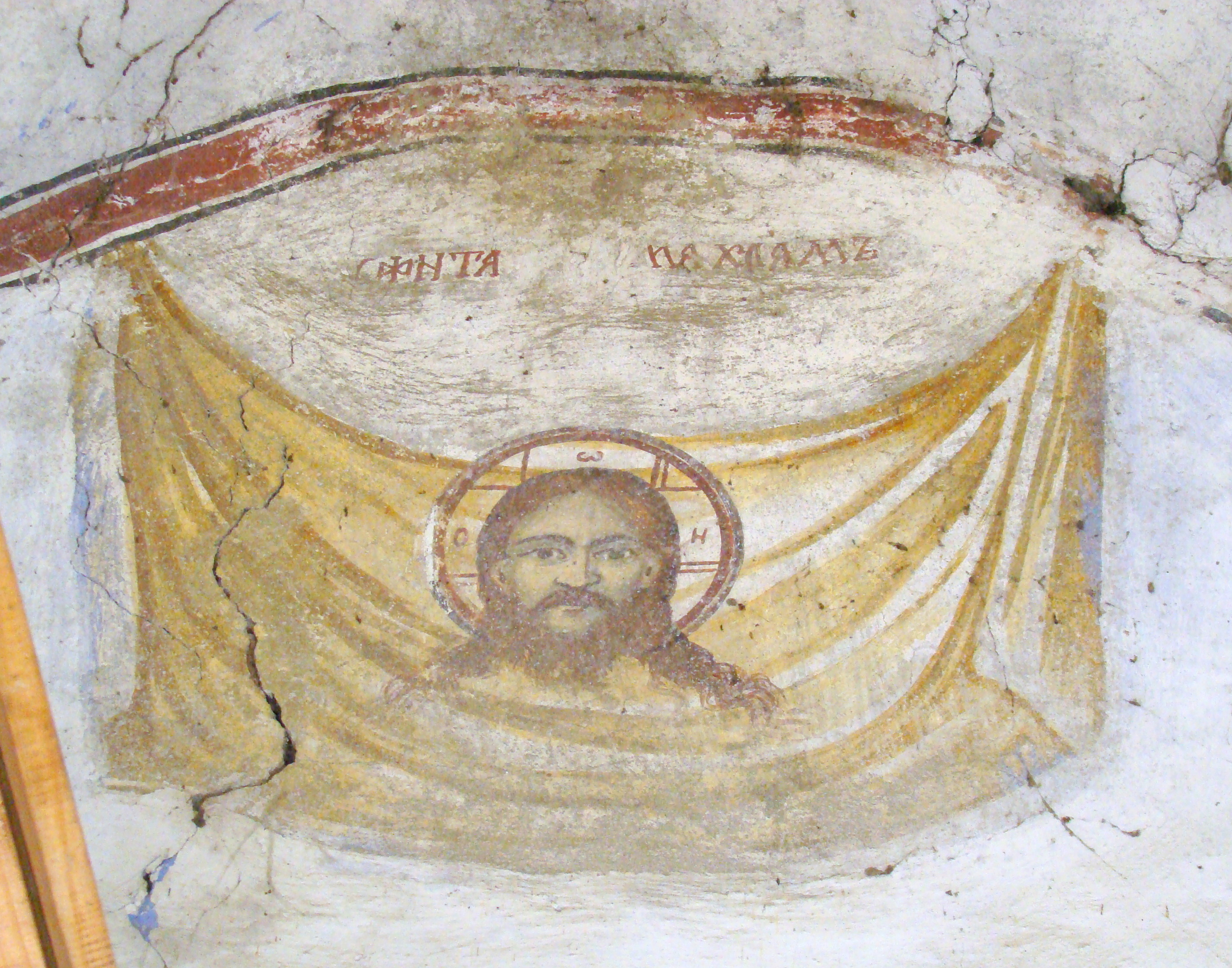 Biserica „Sf. Nicolae”, „Sf. Dumitru” și „Sf. Împărați”, sat Prigoria; comuna Prigoria